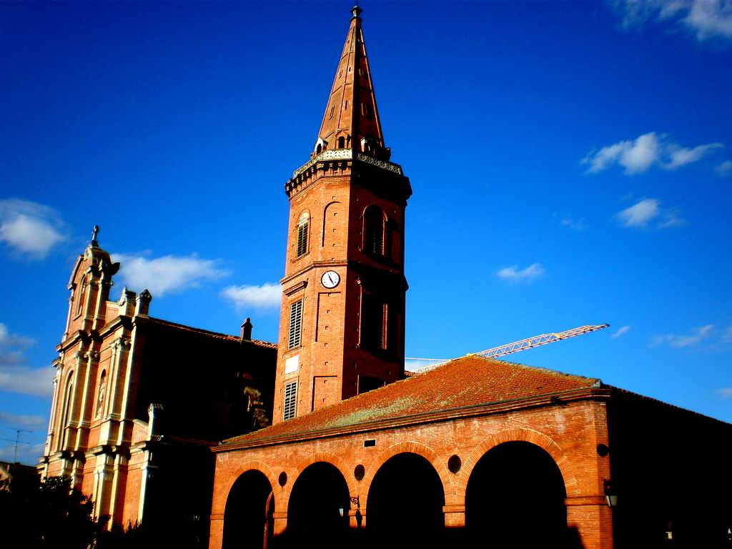 Église à Mazères